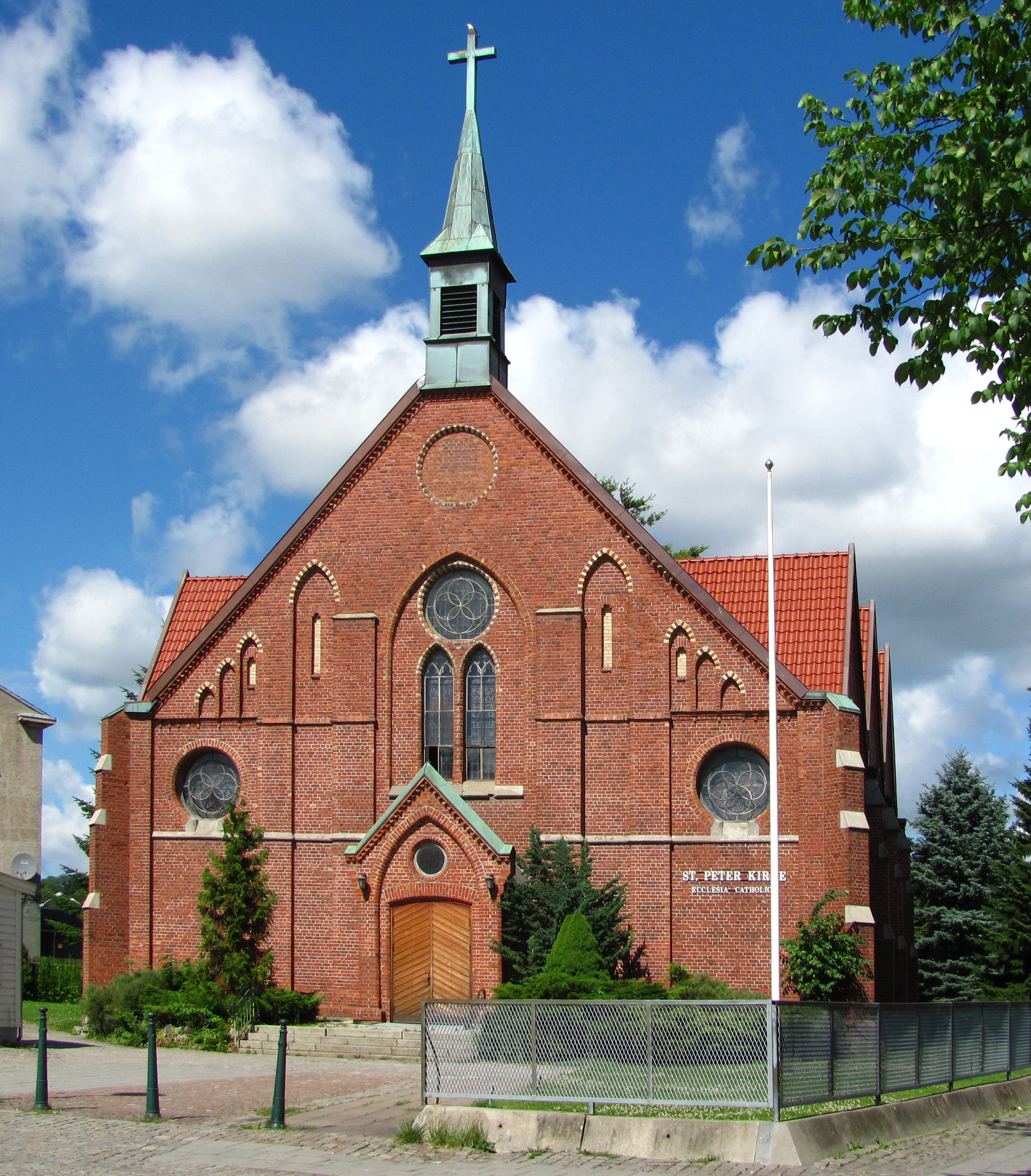 St. Peter katolske kirke i Halden, Østfold.